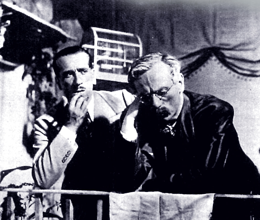 Peppino ed Eduardo De Filippo in "Sono stato io!" (Matarazzo, 1937)